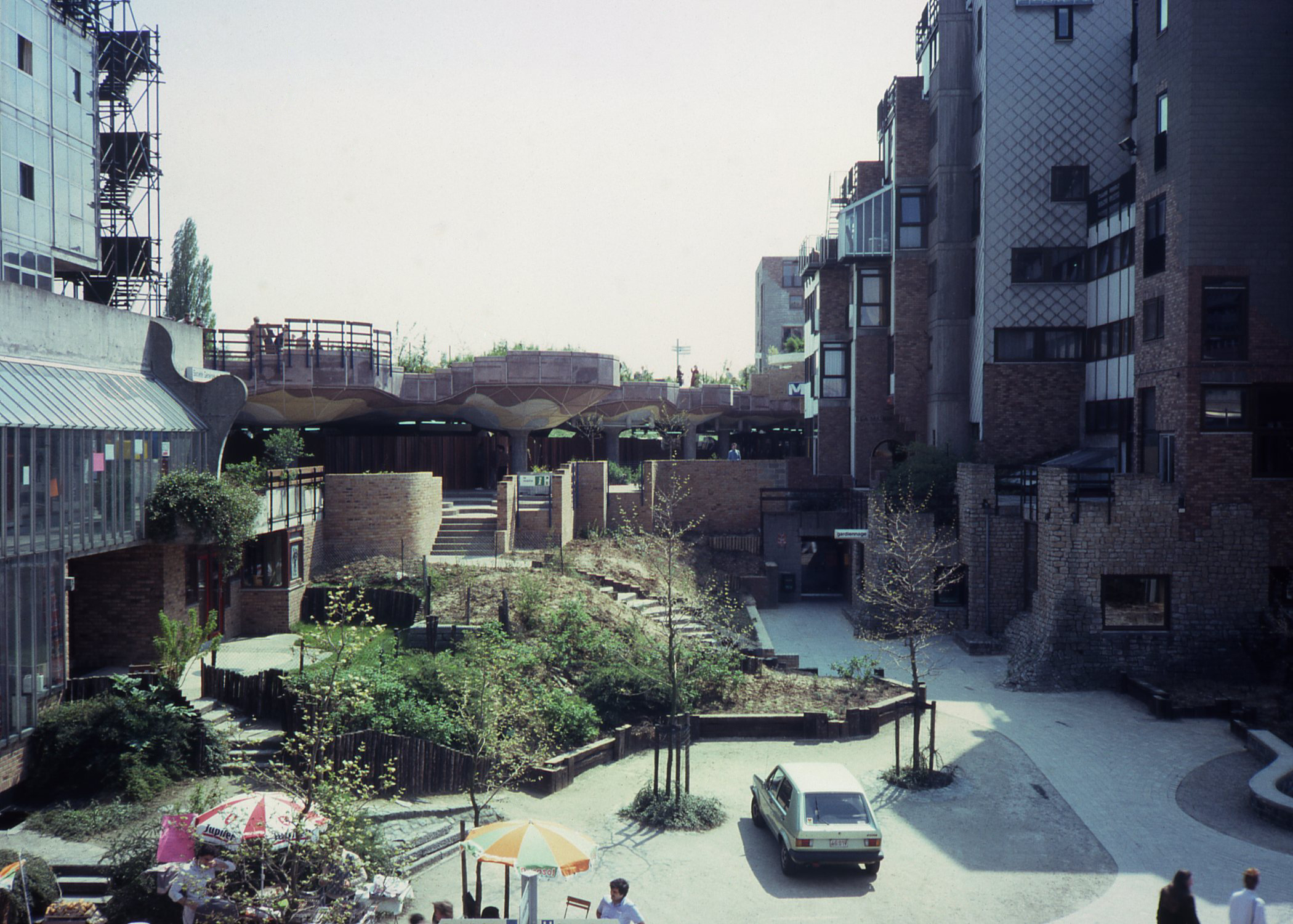 Het metrostation bij de opening